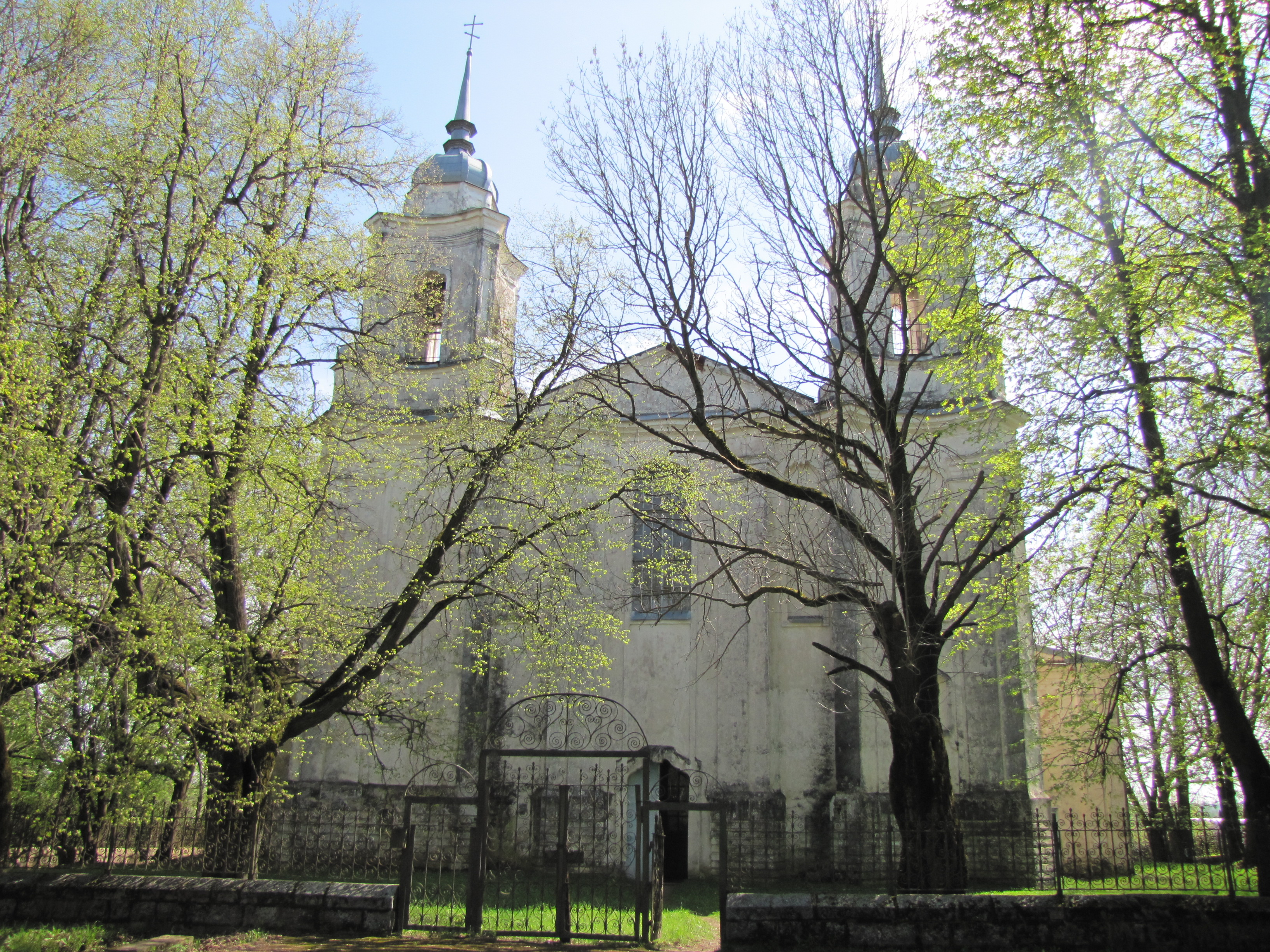 Церковь Успения Богородицы в селе Любавичи, XVIII век.